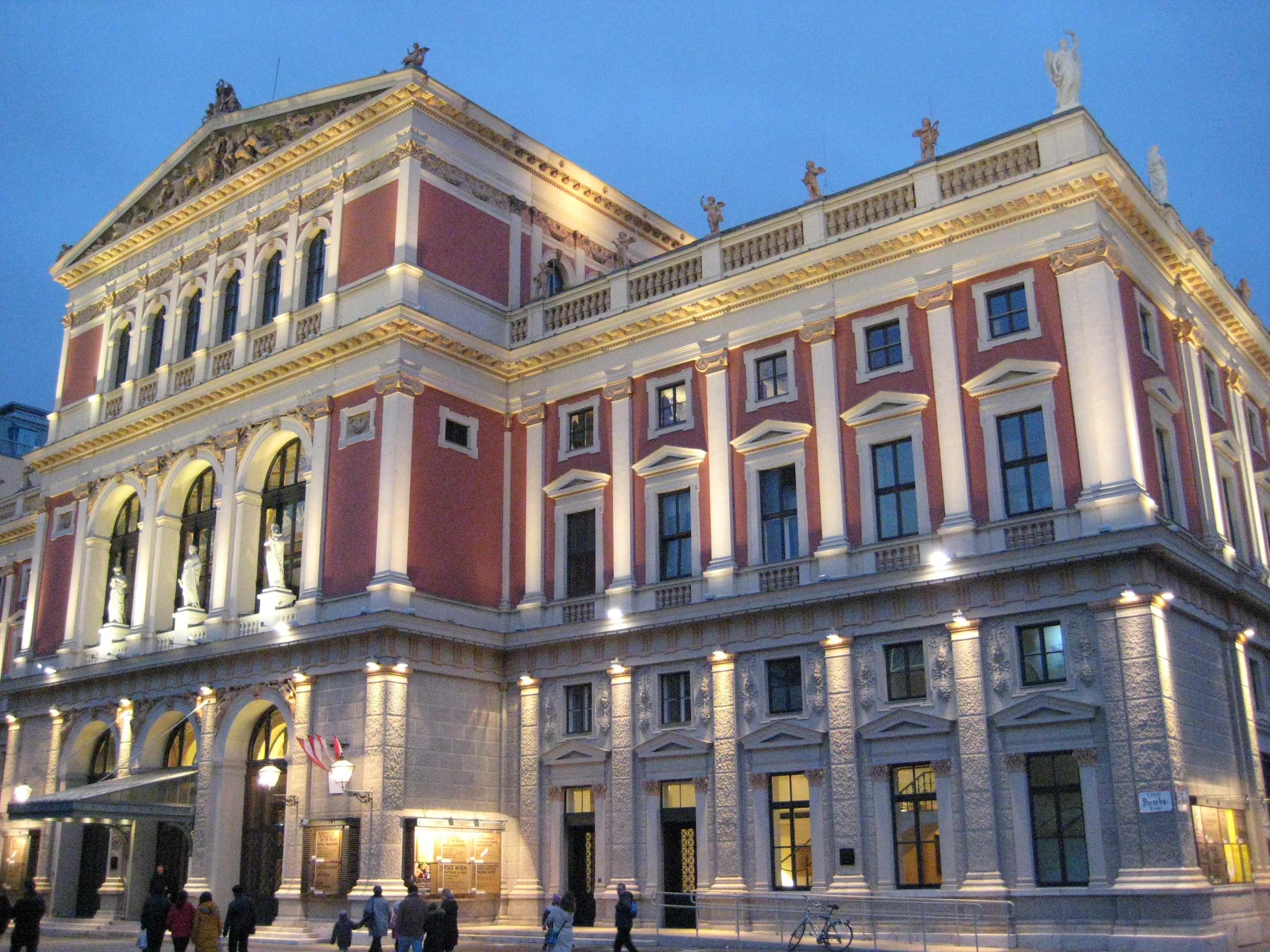 Musikverein (Wien 2008)